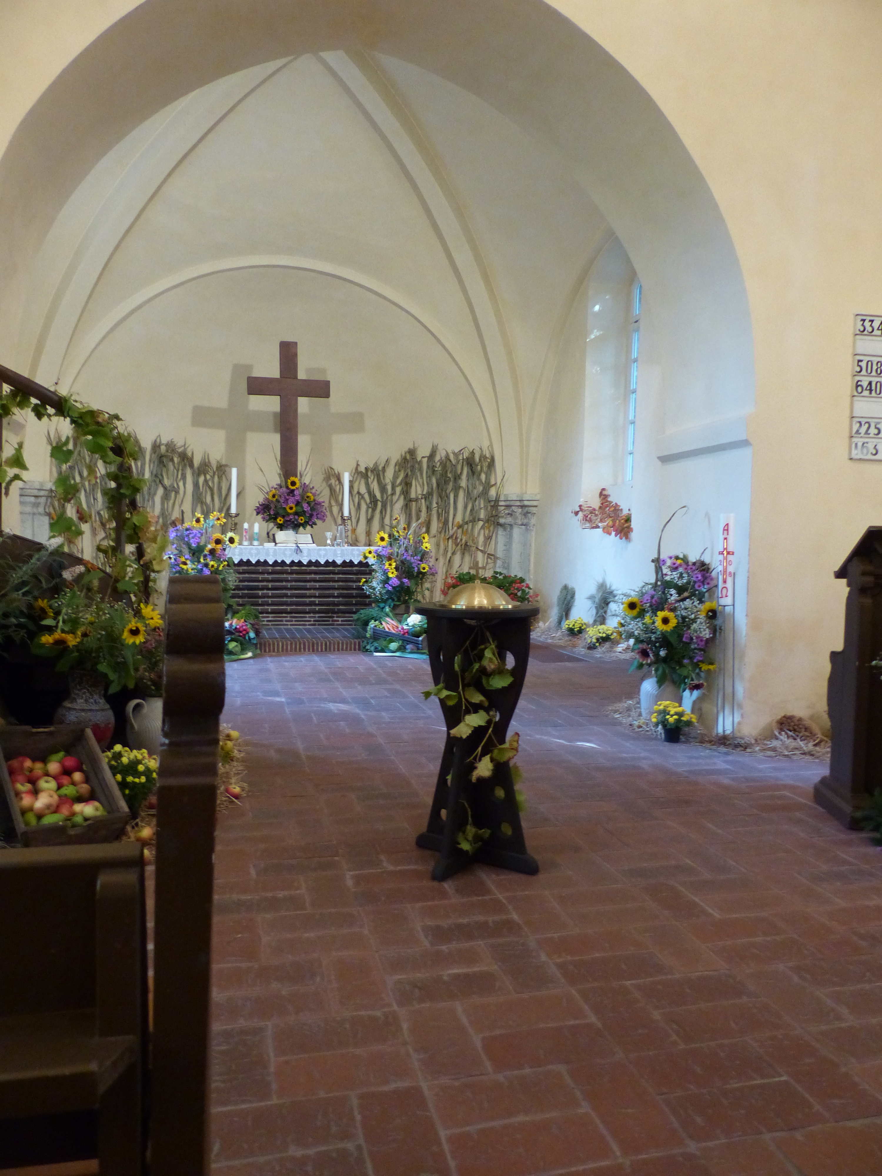 Dorfkirche Wulsdorf, Triumphbogen und Chor